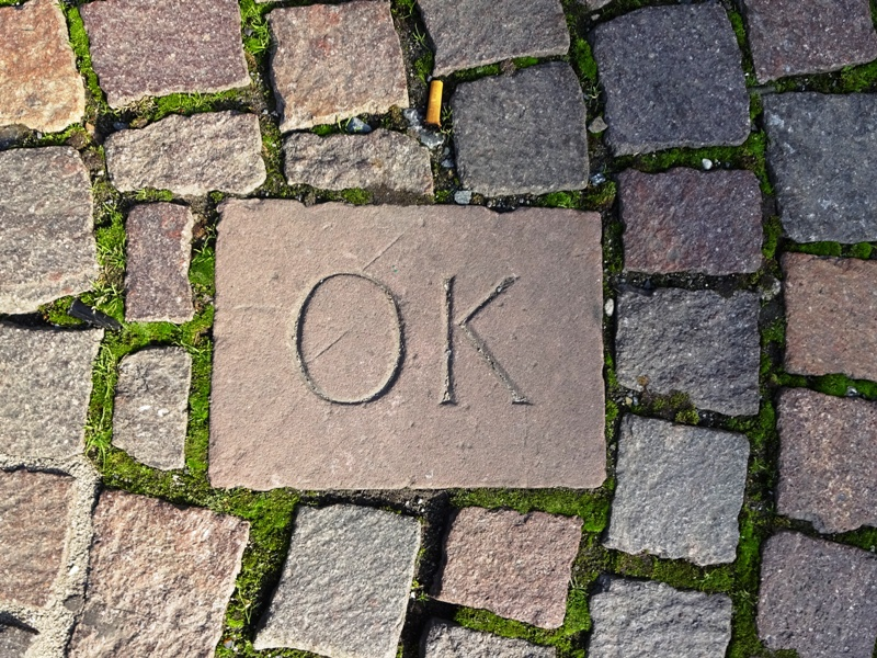 Markierungsstein für die Ochsenküche auf dem Frankfurter Römerberg. Die Markierung besteht aus insgesamt vier gleichen Steinen in der süd-östlichen Ecke des Platzes. Das durch die Markierungssteine gebildete Rechteck soll die Position und Größe der zu den Krönungsfeierlichkeiten aufgebauten Ochsenküche verdeutlichen.